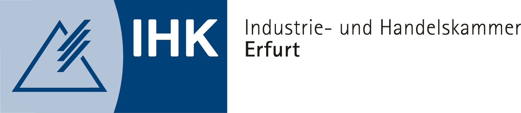 Offizielles Logo der IHK Erfurt